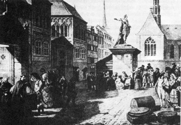 Mniši opouštějí klášter - V roce 1791 zrušil Josef II. většinu klášterů.